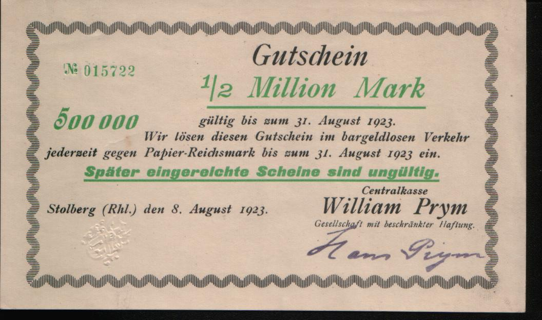 Notgeld der Firma Prym. Hier mit Unterschrift von Hans Prym. Ausgabe 8. August 1923 (Privatbesitz NORLU)